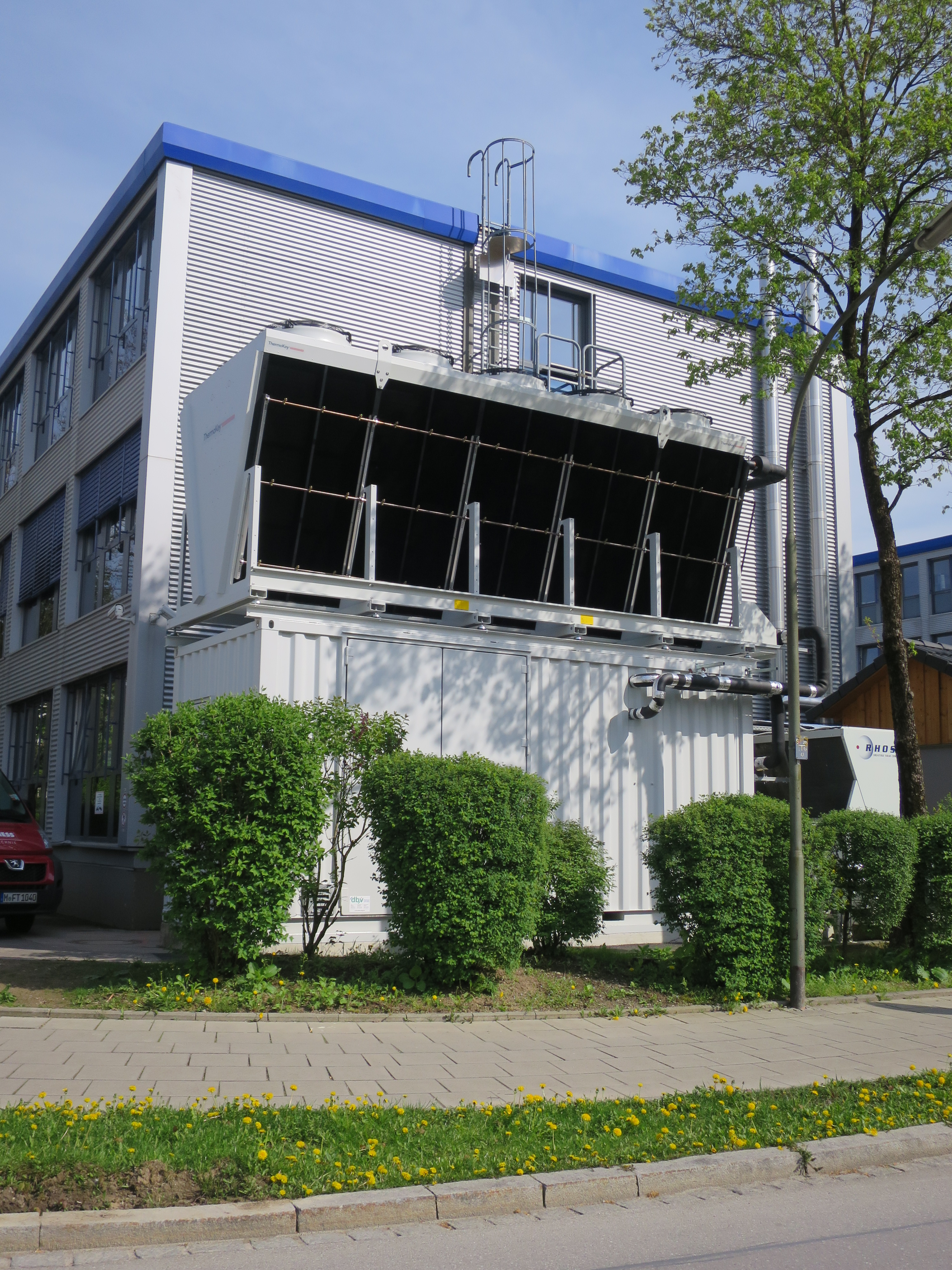 Absorptionskältemaschine in Unterföhring, gespeist durch geothermische Ferwärme